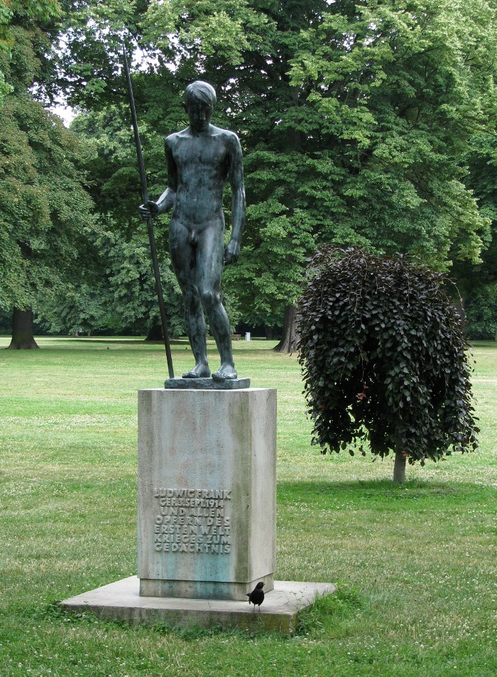 Denkmal "Jüngling mit Stab" von Bernhard Bleeker im unteren Luisenpark in Mannheim von 1950. Inschrift: LUDWIG FRANK GEF. 3. SEPT. 1914 UND ALLEN OPFERN DES ERSTEN WELTKRIEGES ZUM GEDÄCHTNIS